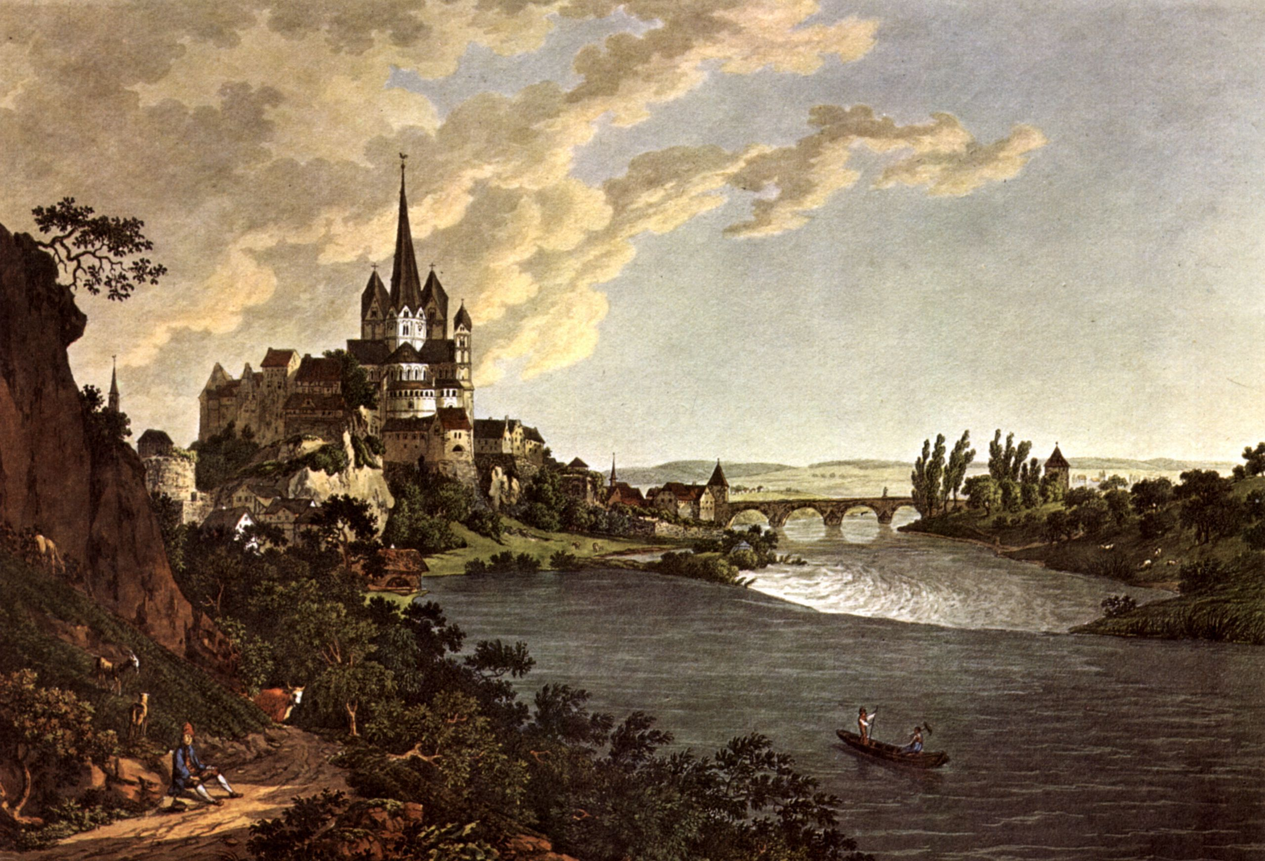 Limburg an der Lahn, Gesamtansicht mit Domberg und Lahn